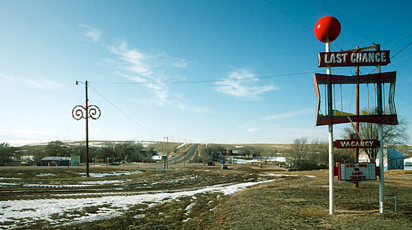 last chance, colorado